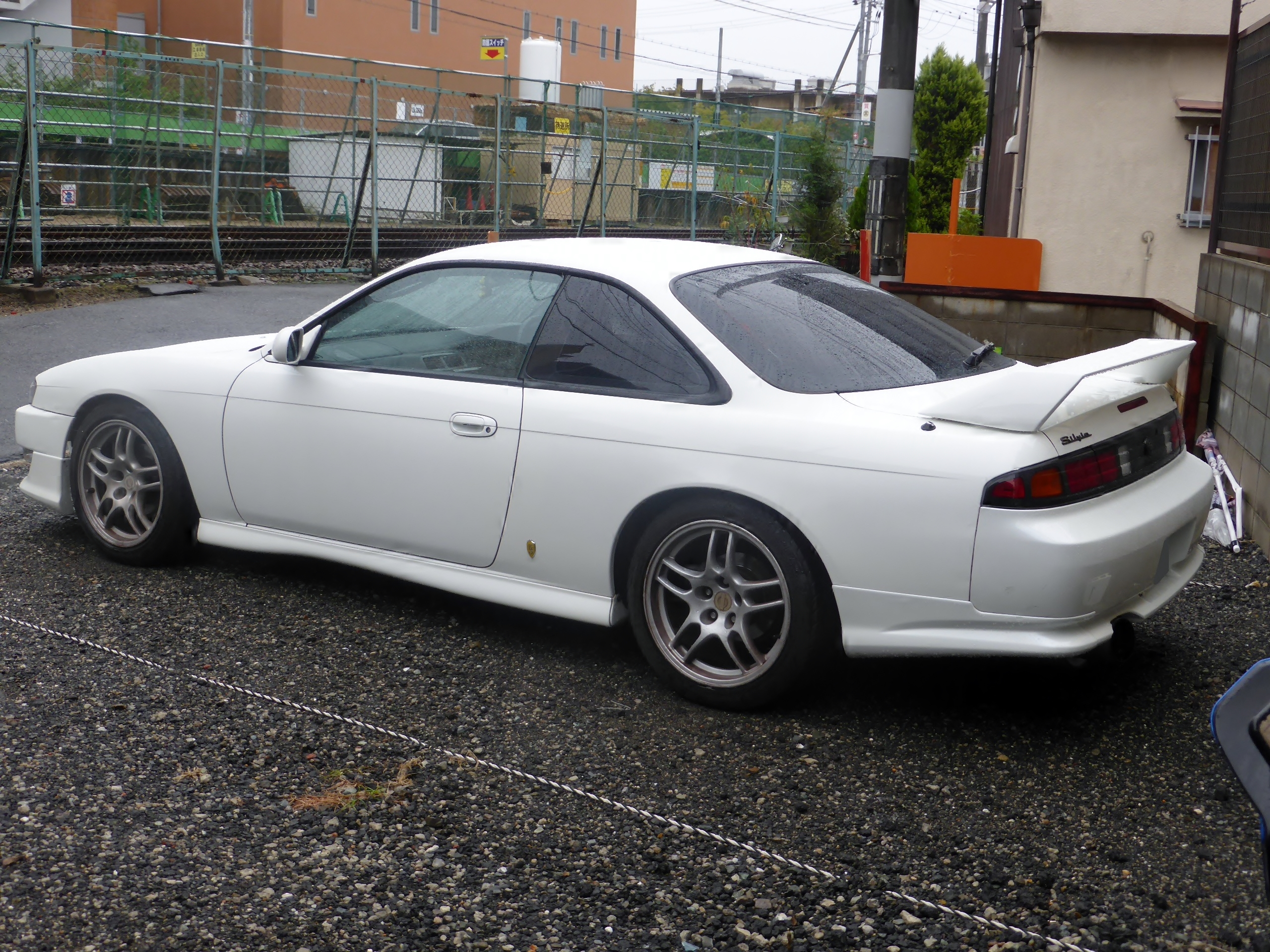 S14後期型日産・シルビアK's SEを左から撮影。